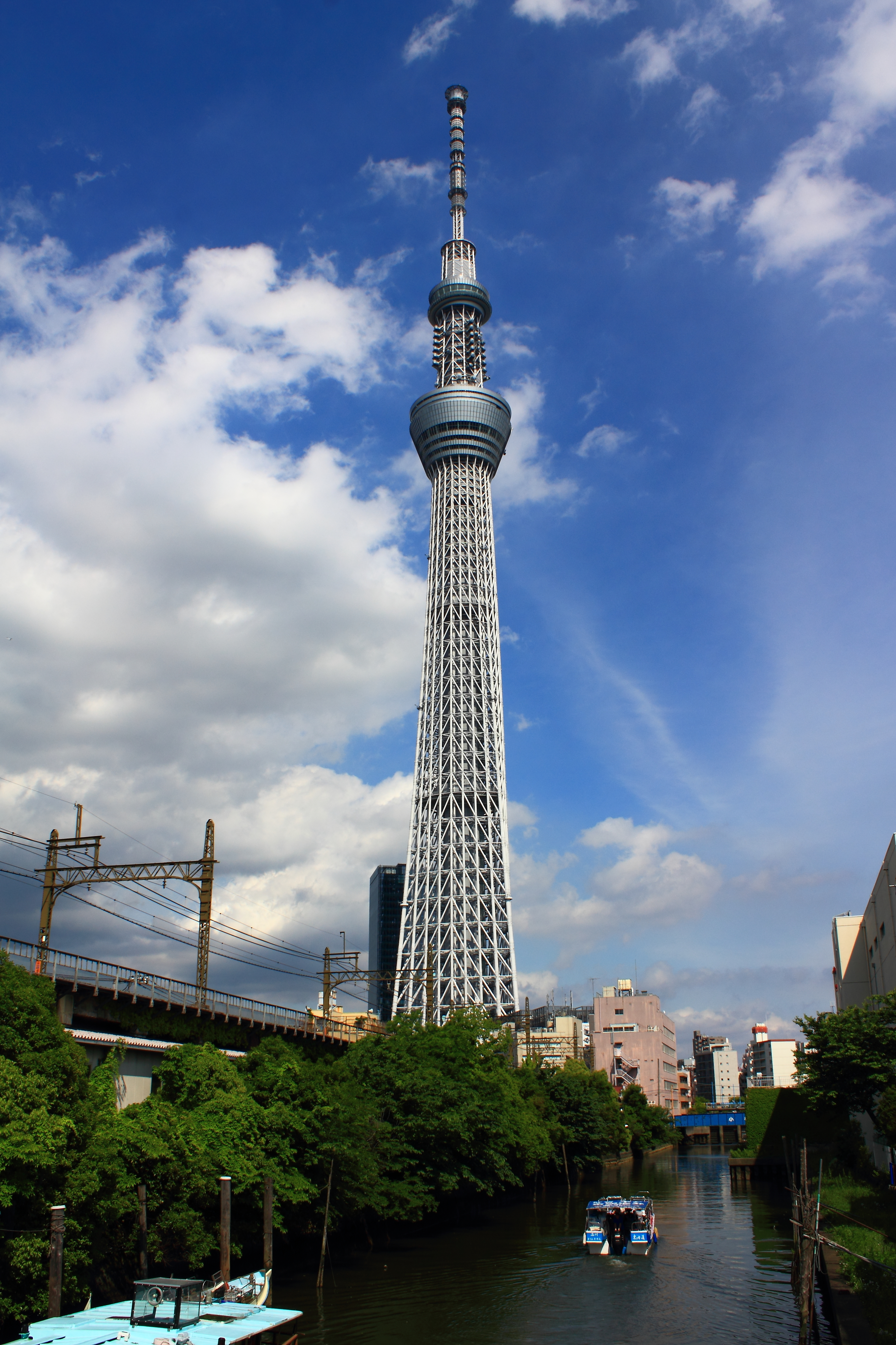 東京スカイツリー（東京都墨田区）。西から（北十間川の源森橋より）。